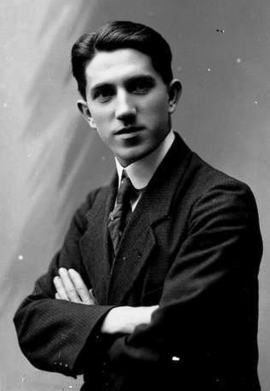 Manuel de Castro González